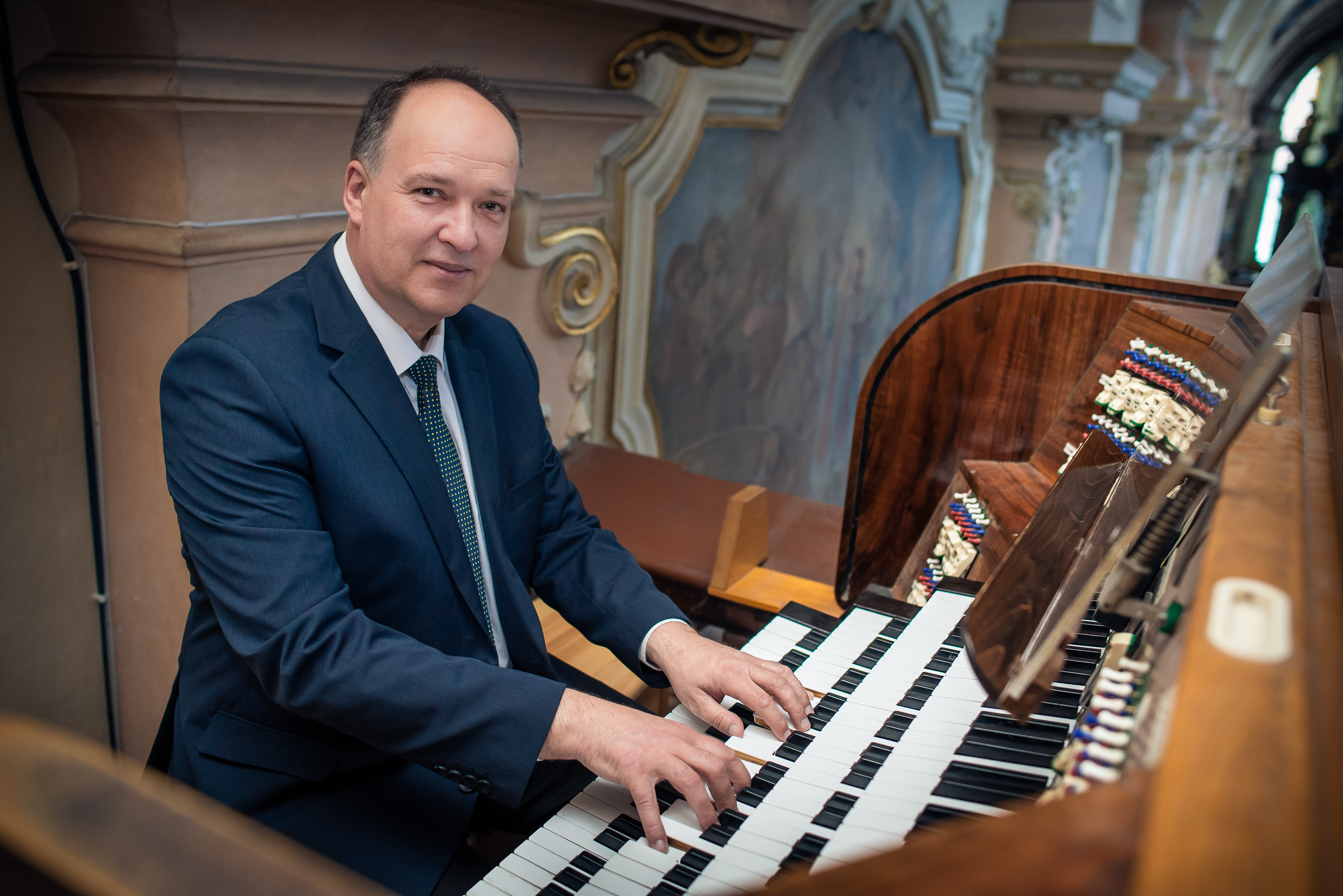 Vladimír Roubal u nástroje v bazilice Nanebevzetí Panny Marie v Praze na Strahově